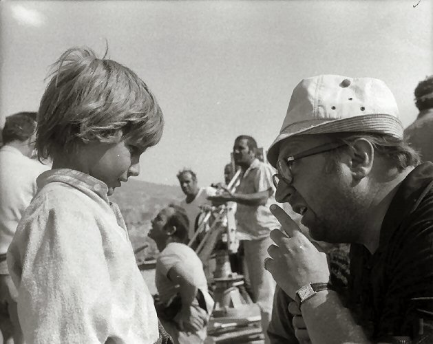 Enzo Santaniello (a sinistra) e Enzo Leone sul set di "C'era una volta il West".